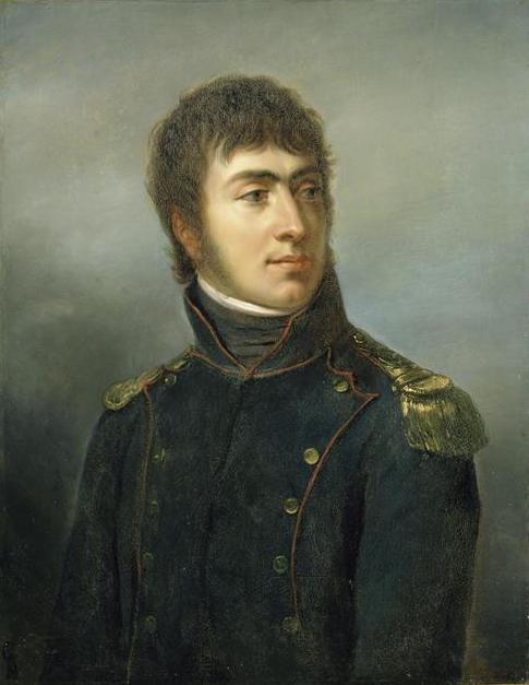 Commandé par Louis-Philippe pour le musée historique de Versailles en 1835